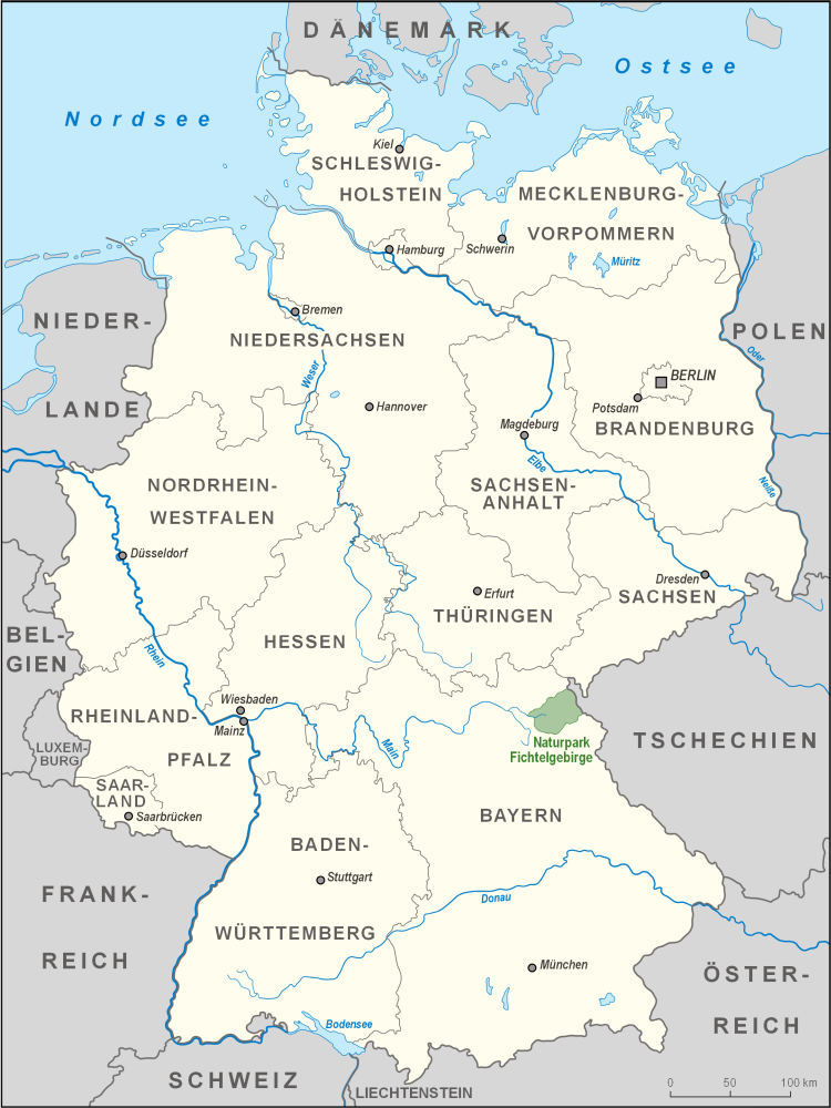 Karte des Naturparks Fichtelgebirge in Deutschland